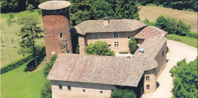 Tour de Chavagneux